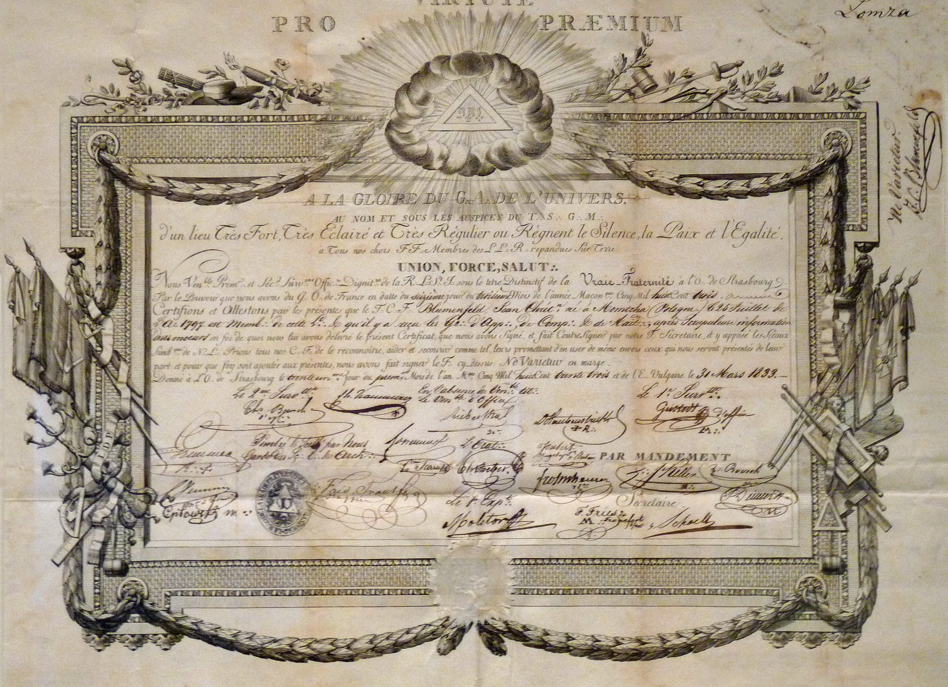 Franc-maçonnerie à Strasbourg : certificat de maître délivré en 1833 par La Vraie Fraternité à Jean Chrétien Blumenfeld, né à Mointcha (Pologne) en 1797 (gravure au burin sur papier)